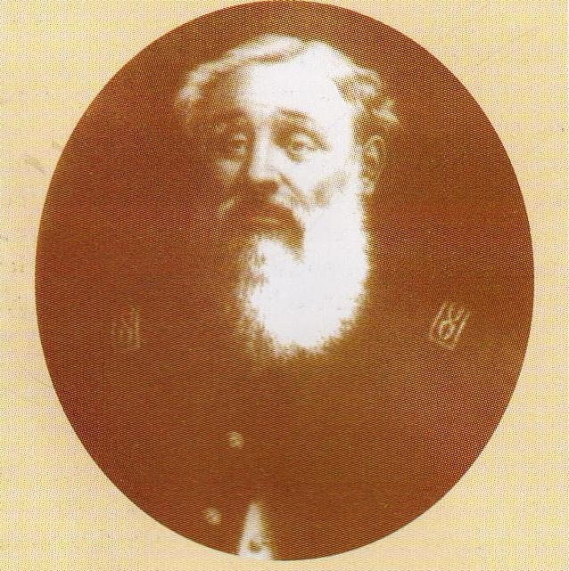 Retrato de Timoteo Aparicio.